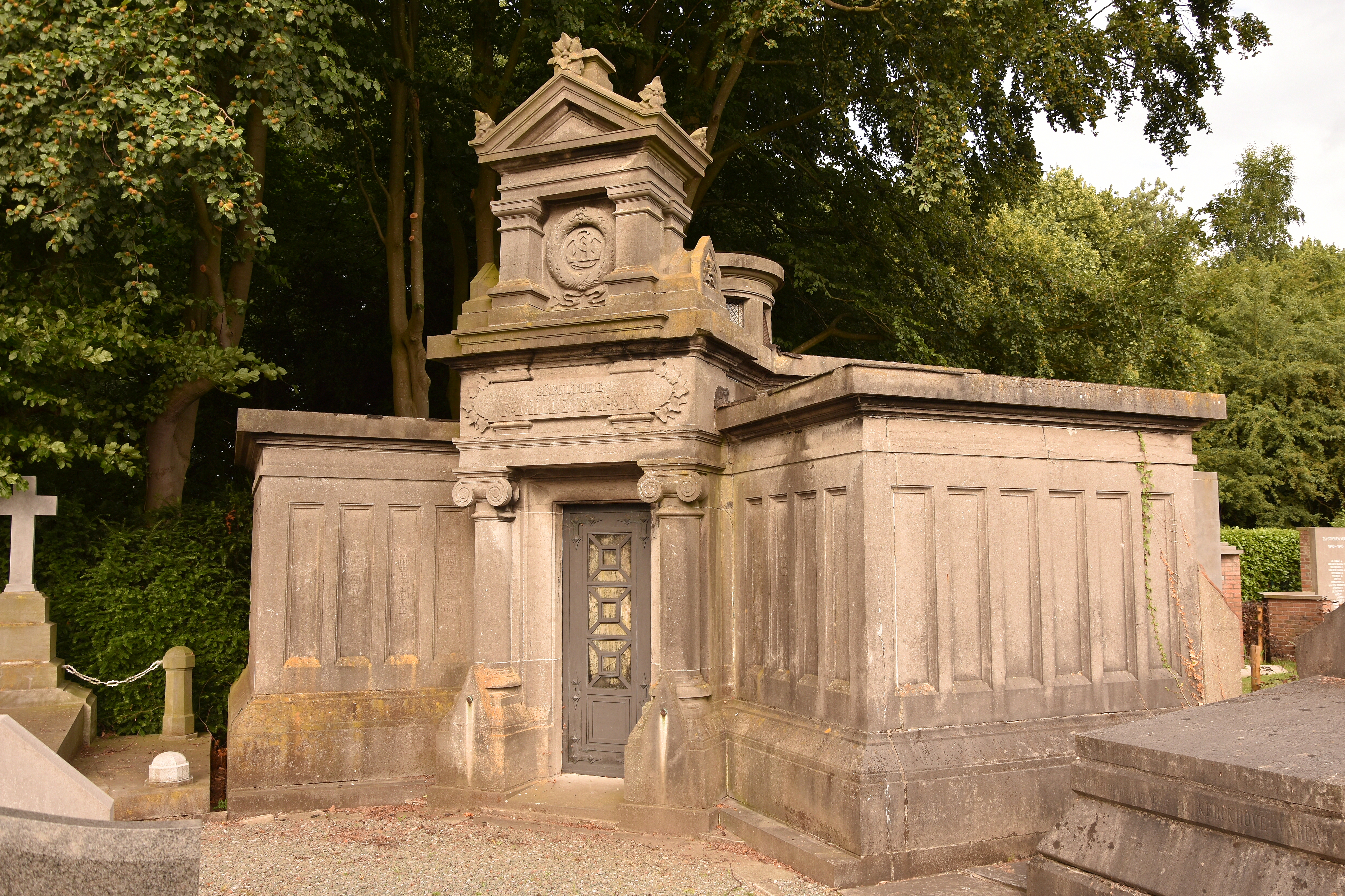 Sint-Niklaaskerk (Leest) grafmonument familie Empain (1880) 16-06-2018